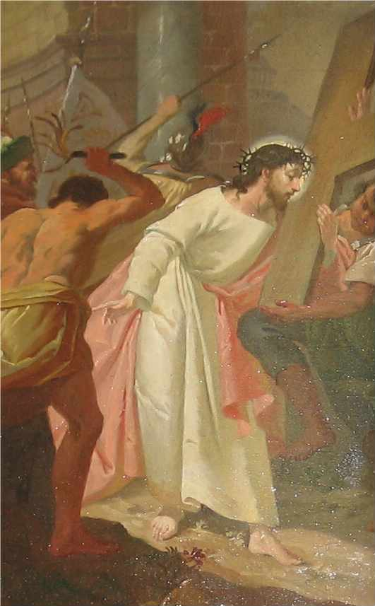 Peinture d'une station du chemin de croix à l'église de Koerich (Luxembourg)